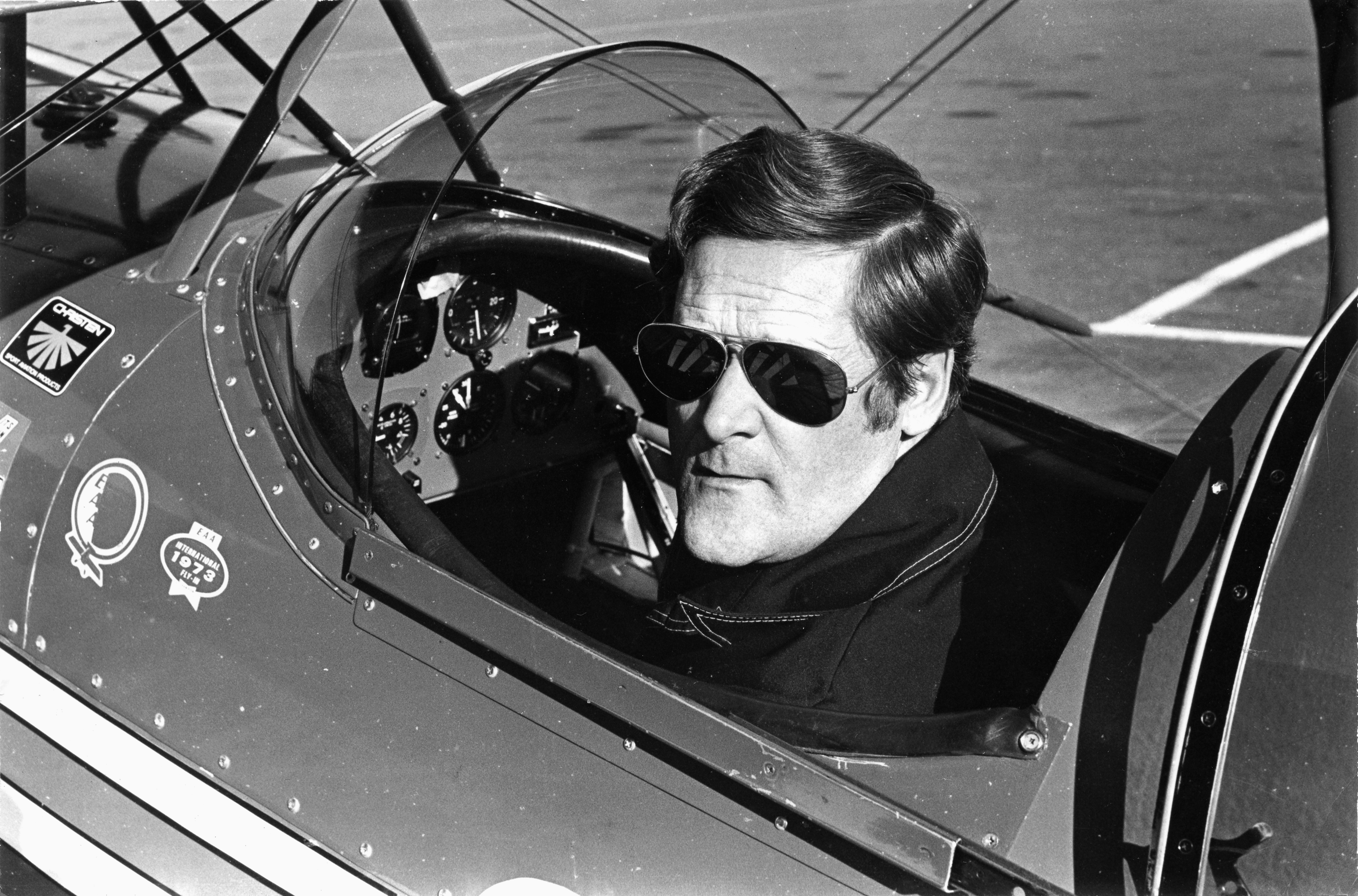 Taitolentäjä Seppo Saario ja rakentamansa Pitts S-1 Special OH-XPA -taitolentokone vuonna 1976.